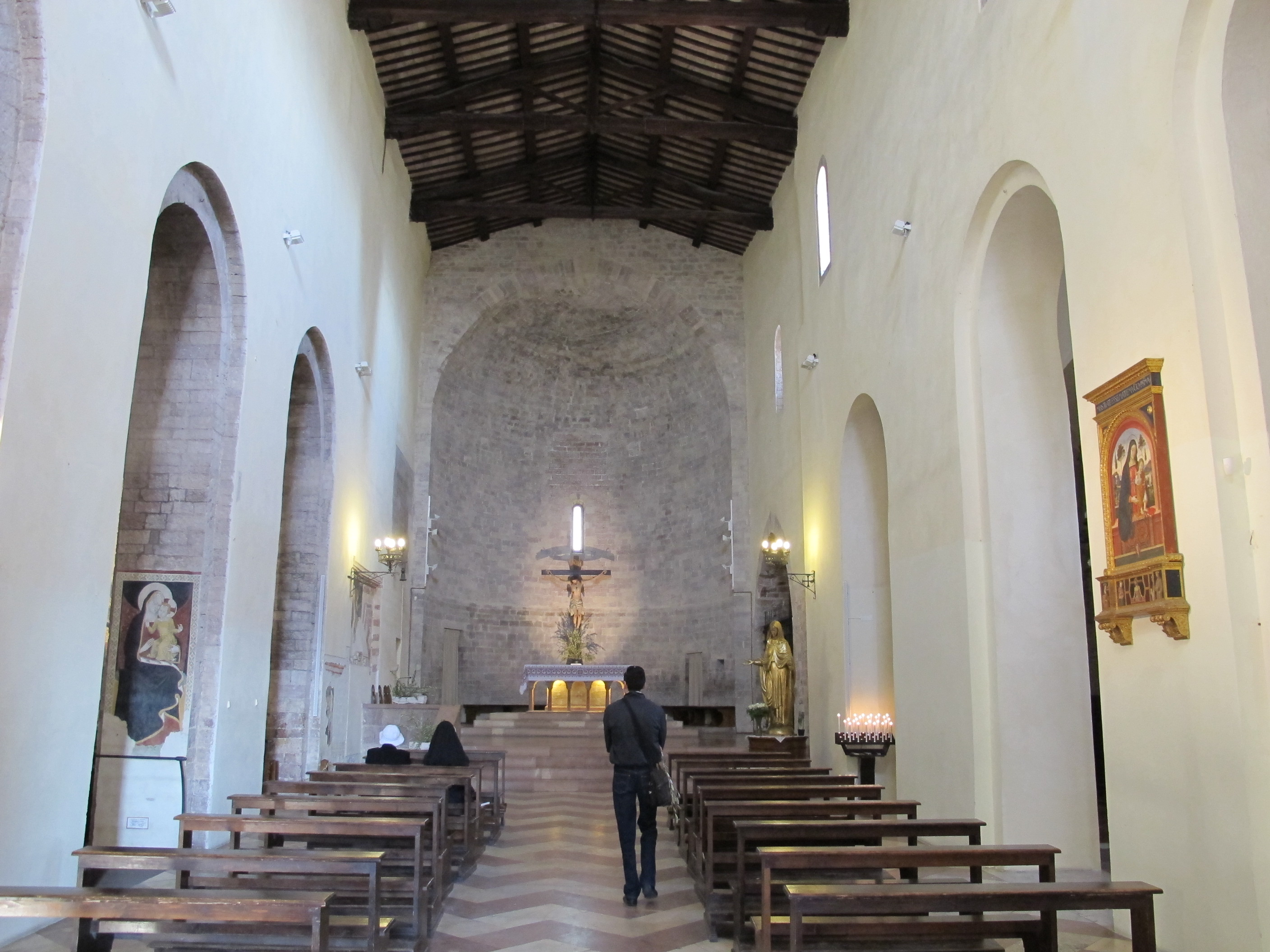 Assisi, santa maria maggiore, interno